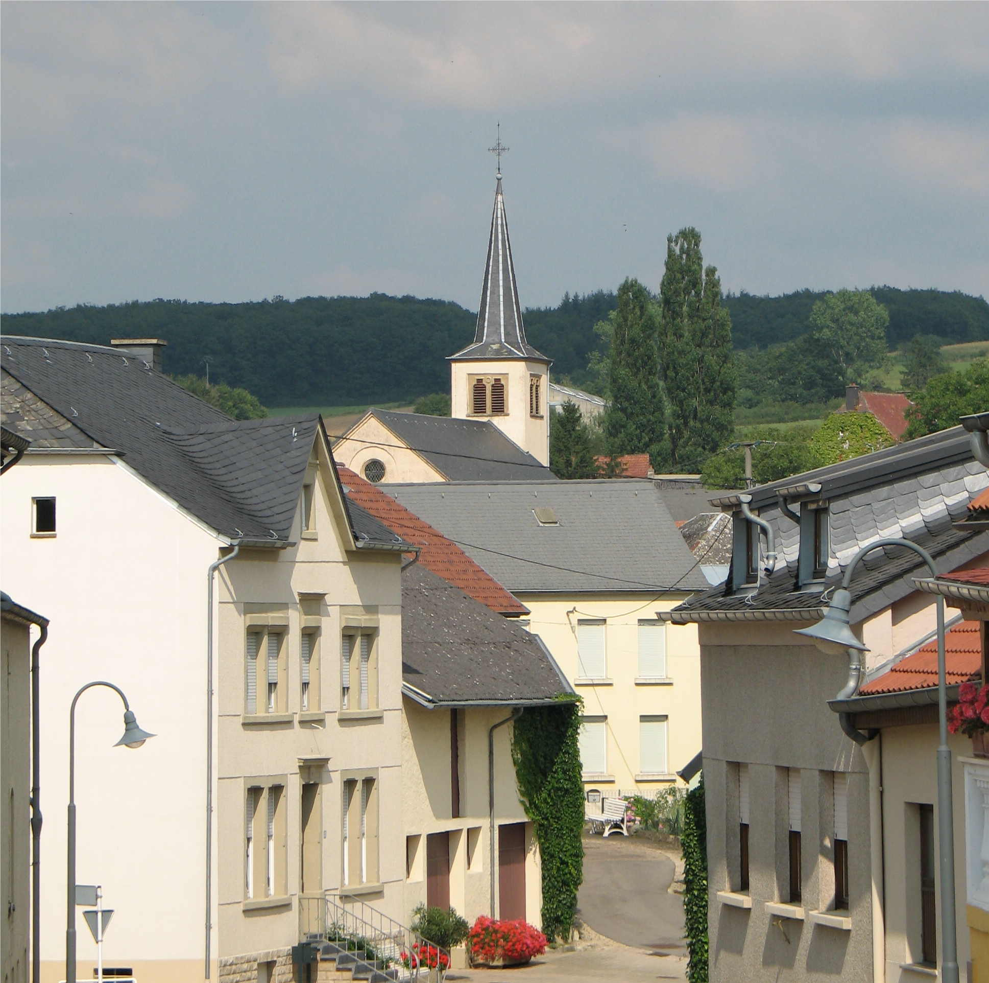 Uesweller